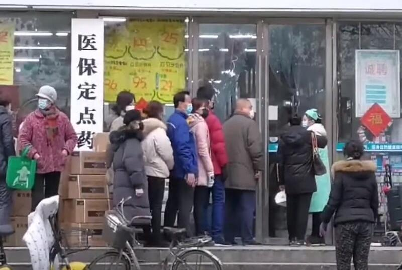 1月23日（北京时间），武汉市民在药店排队购买口罩